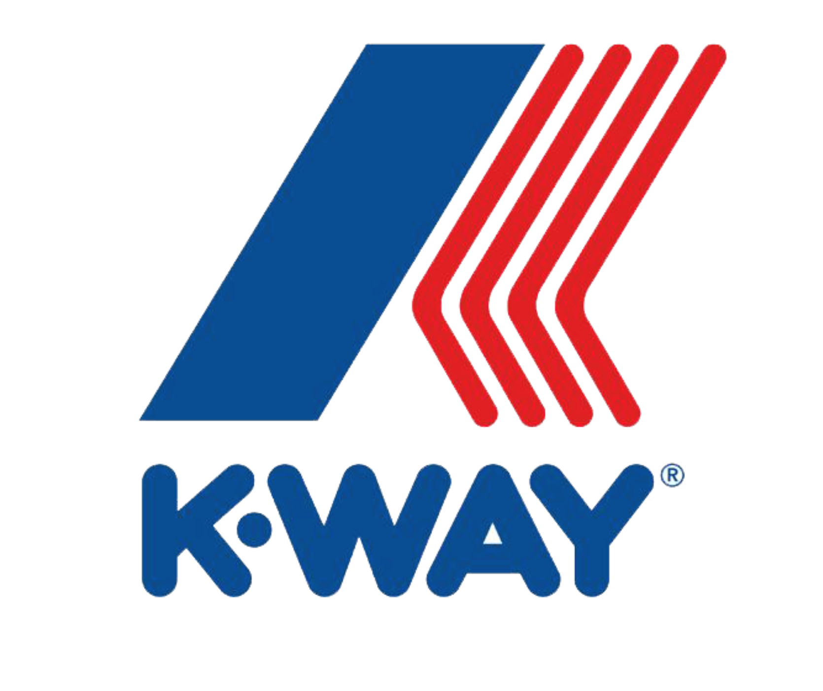 France Brand, Italy Design, Since 1965 1965년 프랑스에서 시작된 이태리 디자인의 케이웨이! 윈드브레이크로 시작하여 현재까지 많은 사랑을 받고있는 프랑스의 국민 브랜드